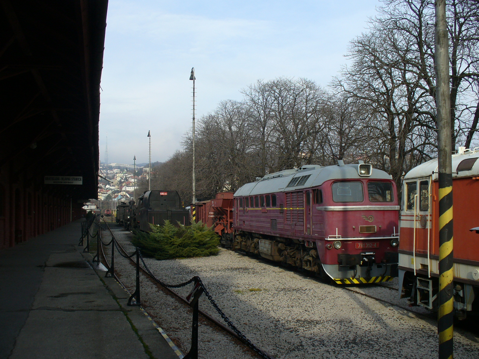 Muzeum dopravy Bratislava.